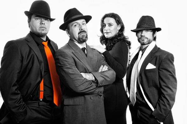 Offtopic 2011